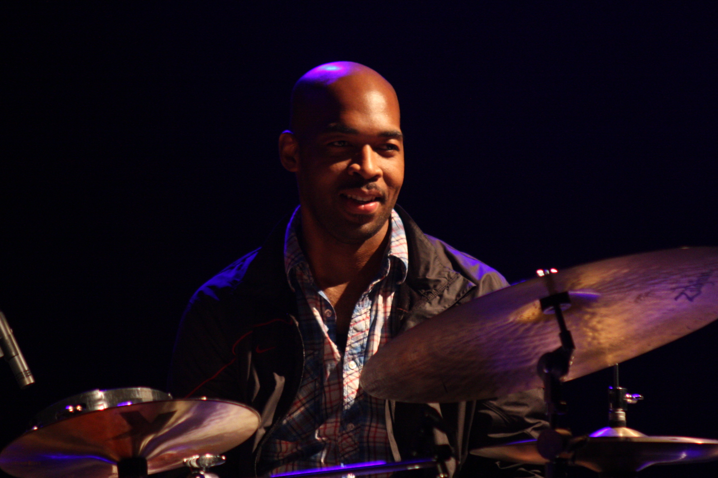 44. Deutsches Jazzfestival Frankfurt 2013: Eric Harland